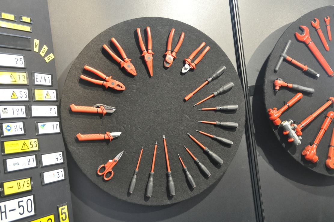 Hannover-Messe April 2012 Dieses Foto entstand durch die Mithilfe des gemeinnützigen Vereins Skillshare bei der Akkreditierung als Fotograf. Infos unter skillshare.eu Skillshare e.V. ist ein eingetragener gemeinnütziger Verein zur Förderung der Bildung durch Unterstützung der Erstellung, Sammlung und Verbreitung so genannten freien Wissens. IBAN: DE16 8306 5408 0004 8850 66 BIC: GENODEF1SLR Bank: VR-Bank Altenburger Land